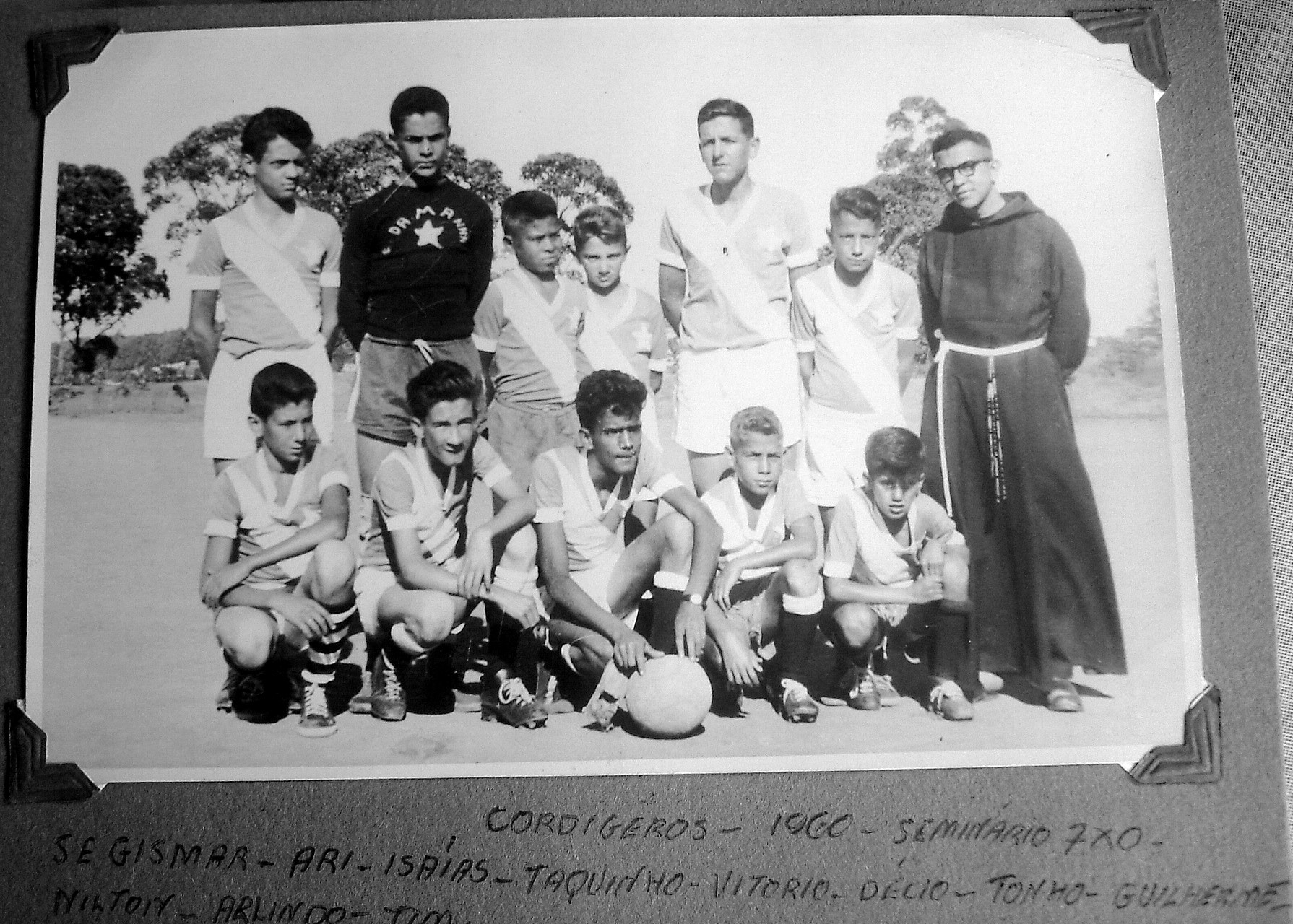 Time de futebol dos Cordígeros, pertencente à Paróquia de N.S.do Rosário de Pompeia dos padres capuchinhos